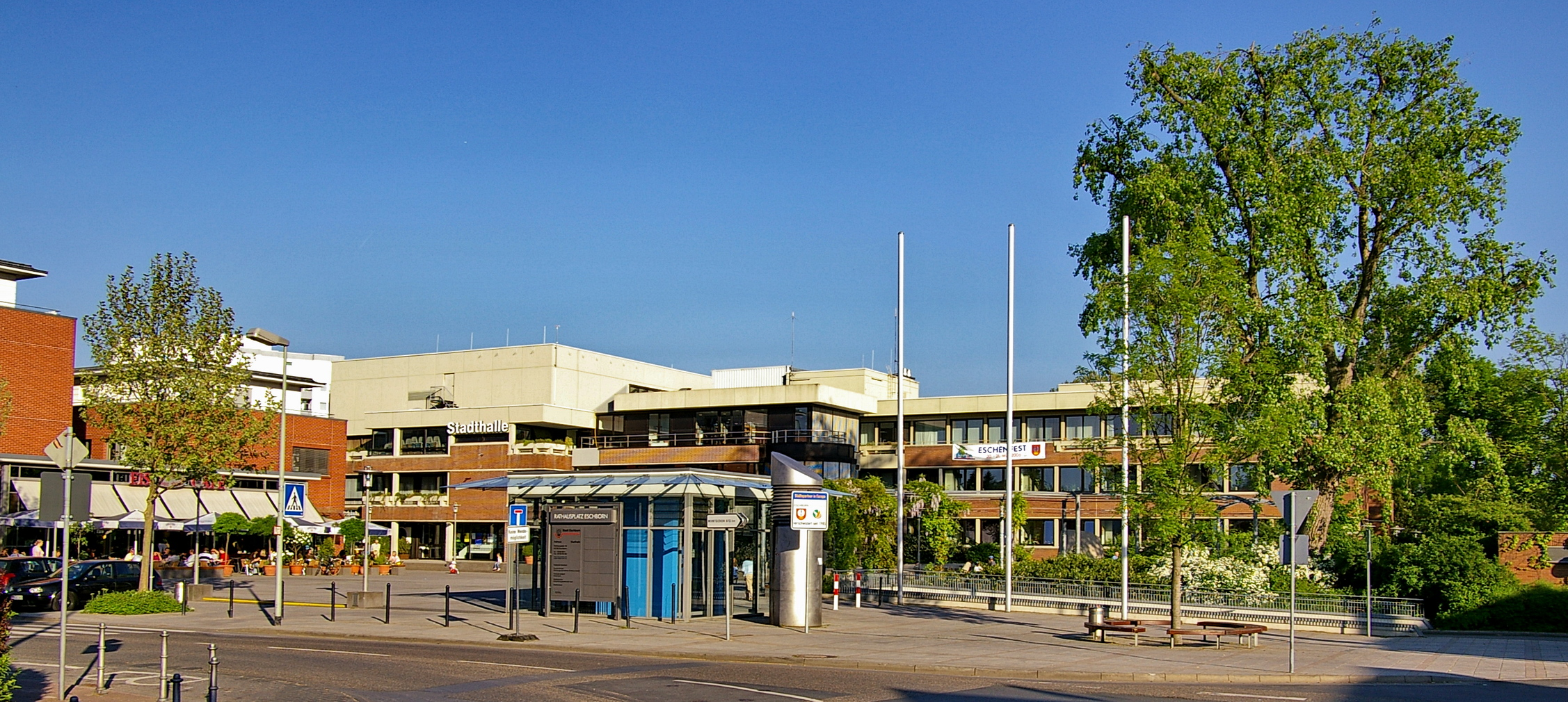 Stadthalle und Rathaus von Eschborn